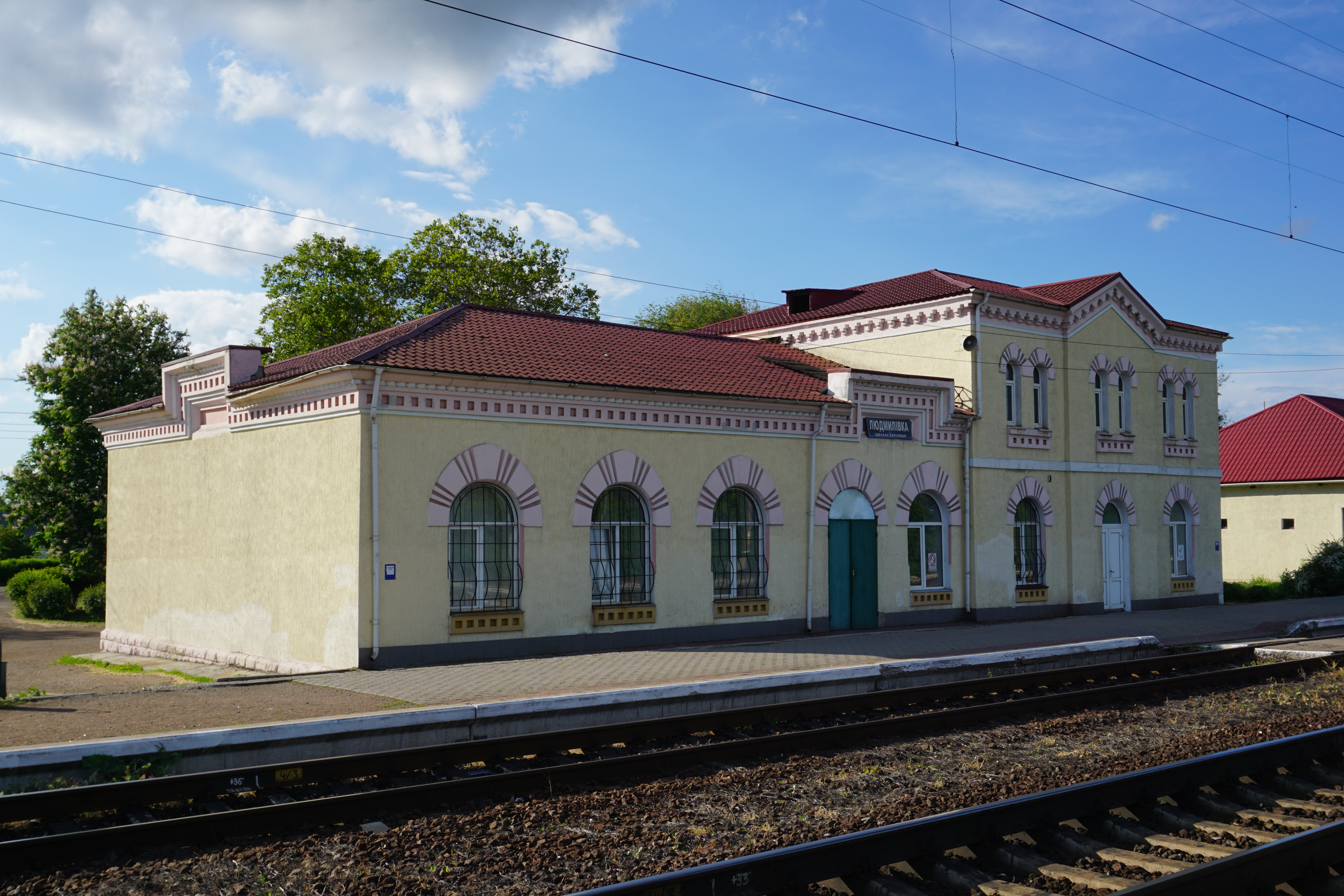 Пасажирська будівля станції Людмилівка (лінія Висоцьке — Колосівка), Одеська залізниця